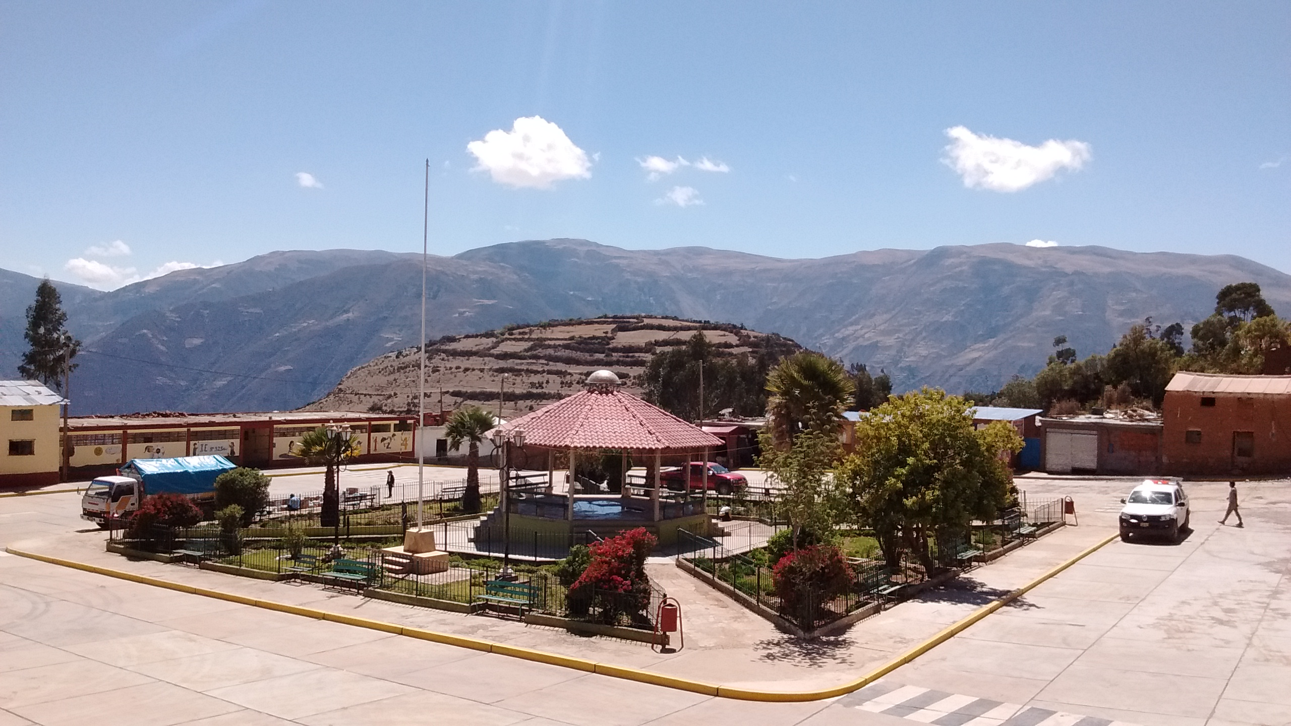 Plaza central de la comunidad campesina de Tiquihua en el Distrito de Hualla, provincia de Victor Fajardo en Ayacucho.